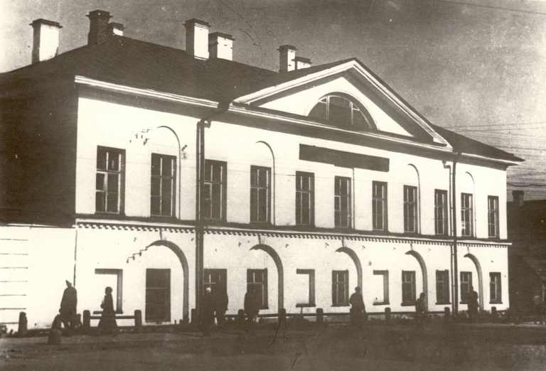 Дом купца Бекренёва, затем в здании размещалась духовная консистория. В советский довоенный период в здании размещалась типография и Карельская областная библиотека. Здание было разрушено в годы Великой Отечетвенной войны.(Улица Пушкинская в Петрозаводске). Архитектор Крамер Фёдор Христианович.